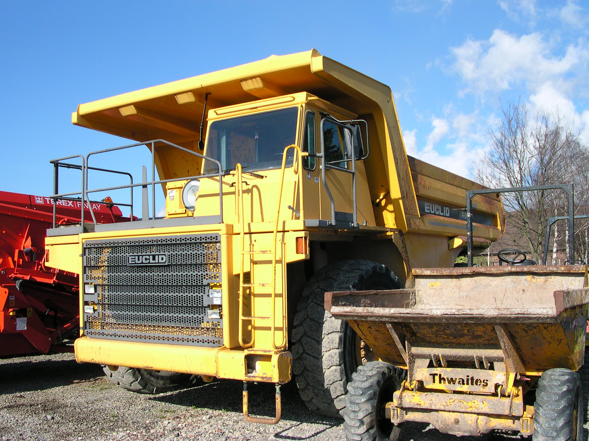 Euclid R60, 60 t, Baujahr 1998